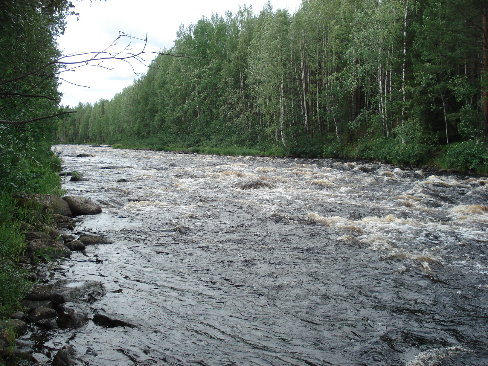 Река Воньга. Порог Ассу.